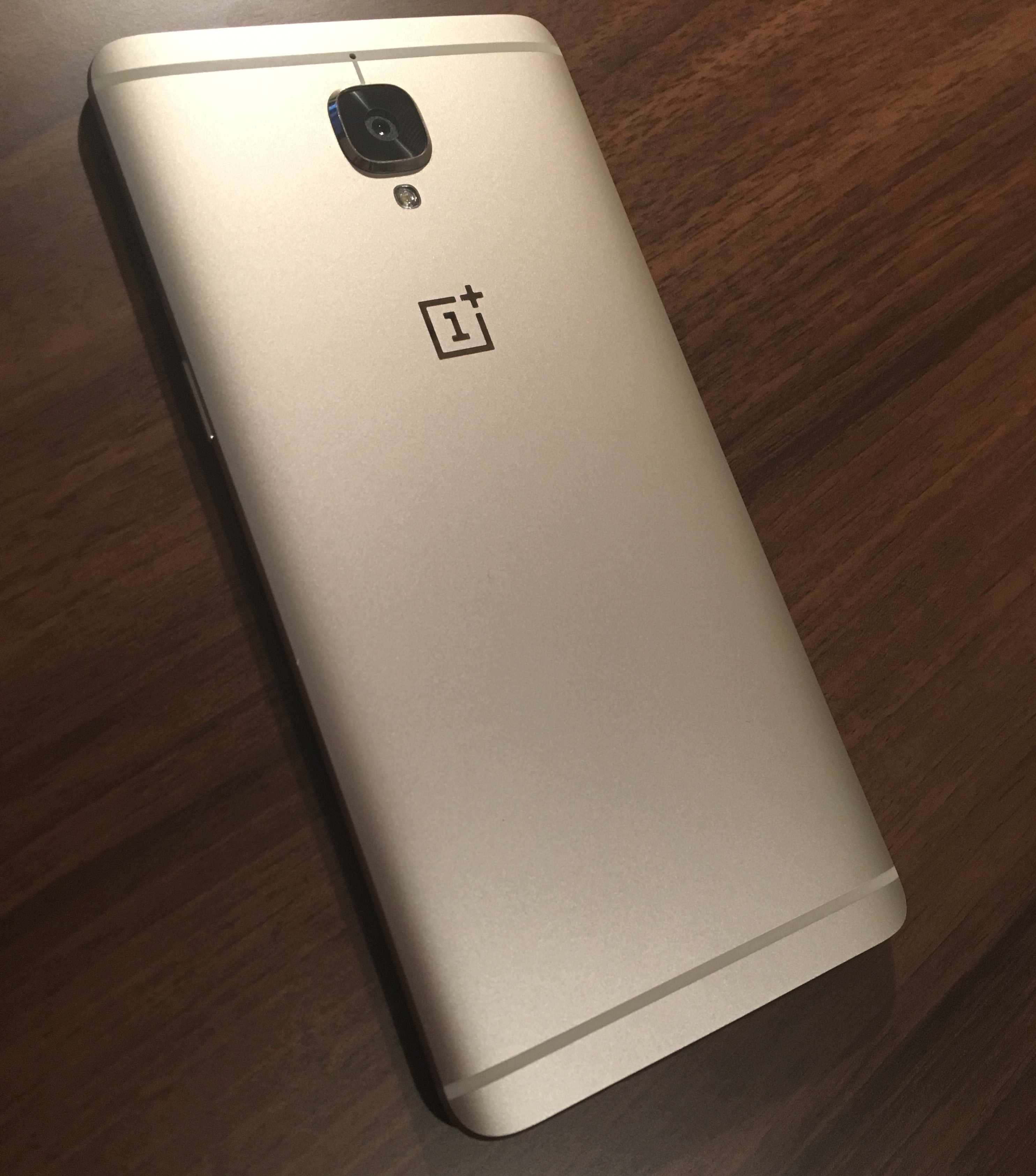 Zdjęcie tyłu telefonu OnePlus 3.